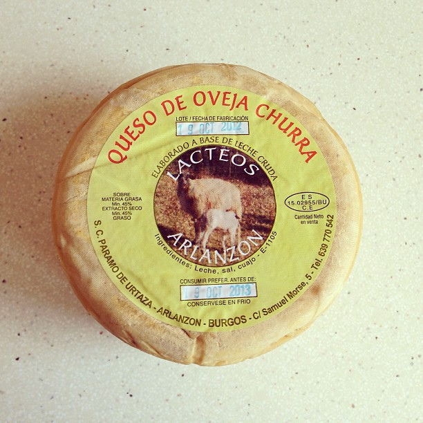 queso #cheese #burgos